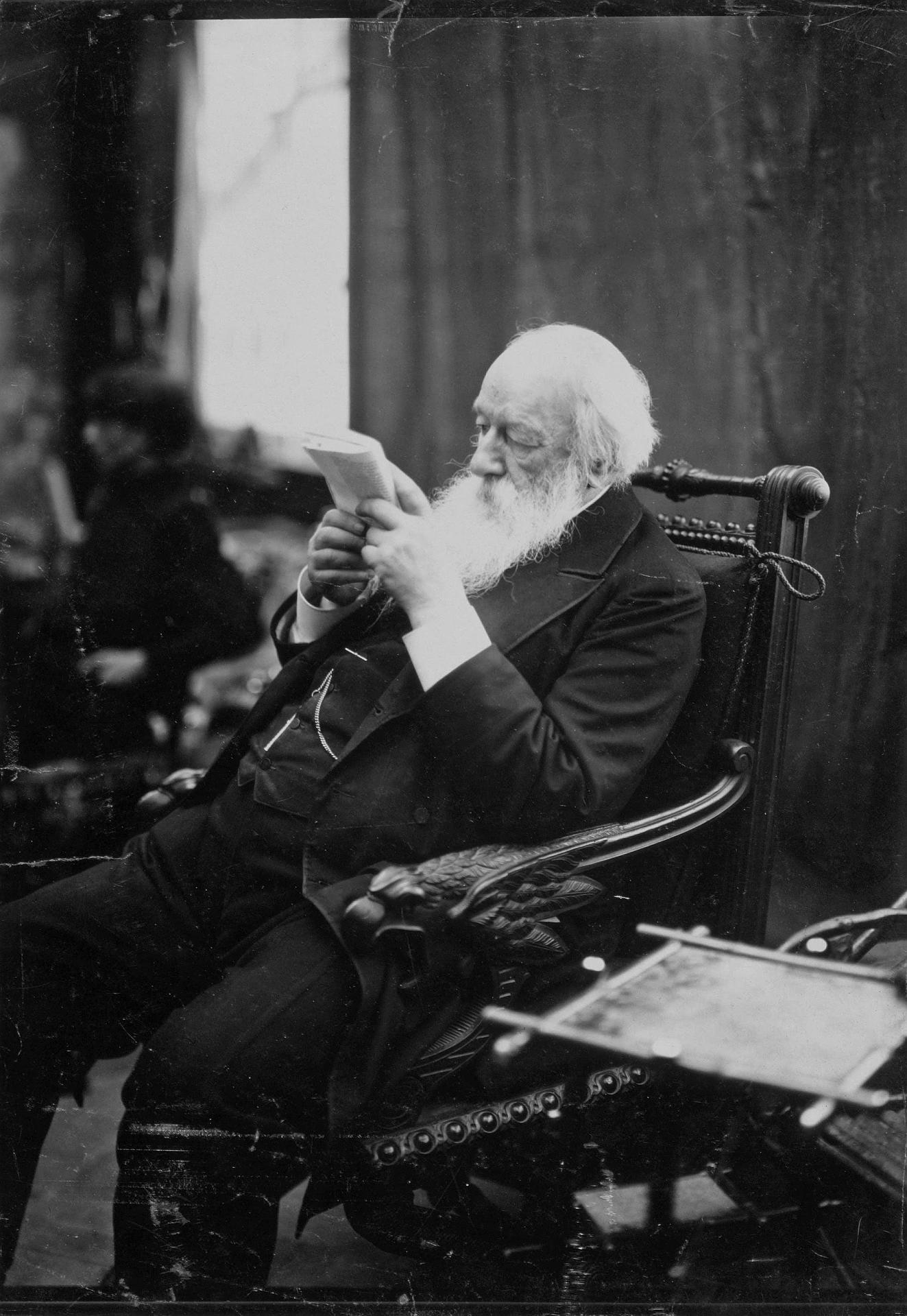 Стасов, Владимир Васильевич